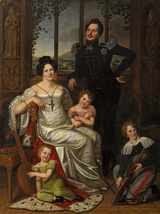 Prinz Wilhelm von Preußen mit seiner Gemahlin, Prinzessin Marianne von Hessen-Homburg und seinen Kindern